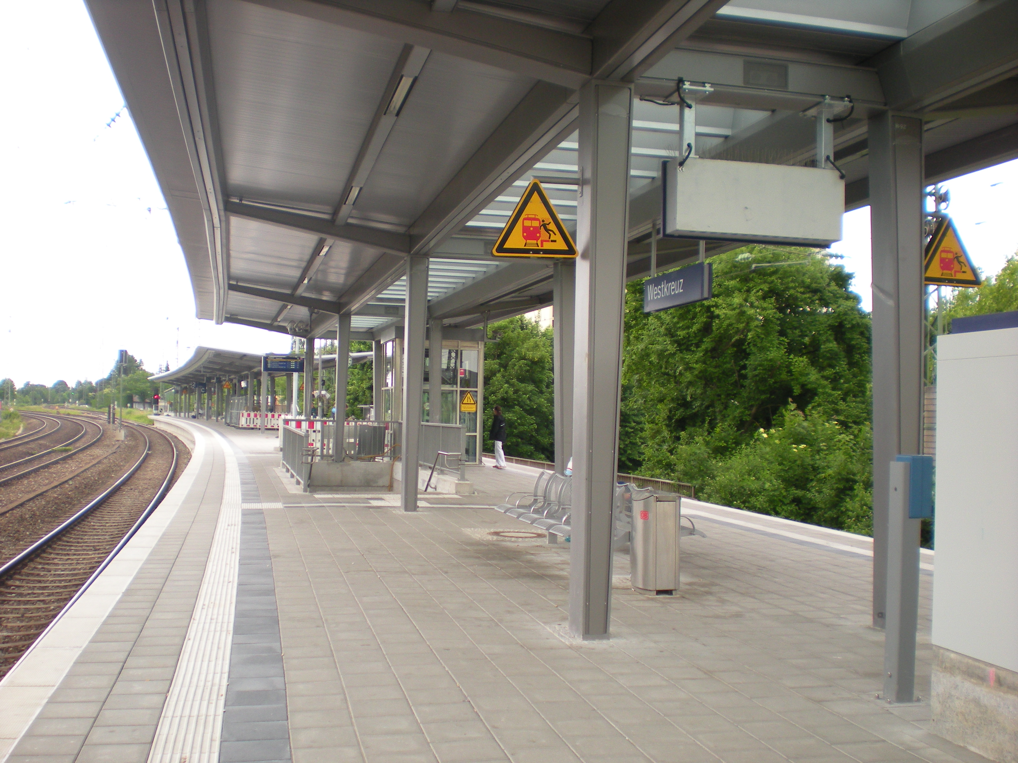 Bahnsteig des S-Bahnhofs München-Westkreuz